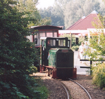 Smalspoor (700 mm) in het Veenpark te Barger-Compascuum. Eigen foto.